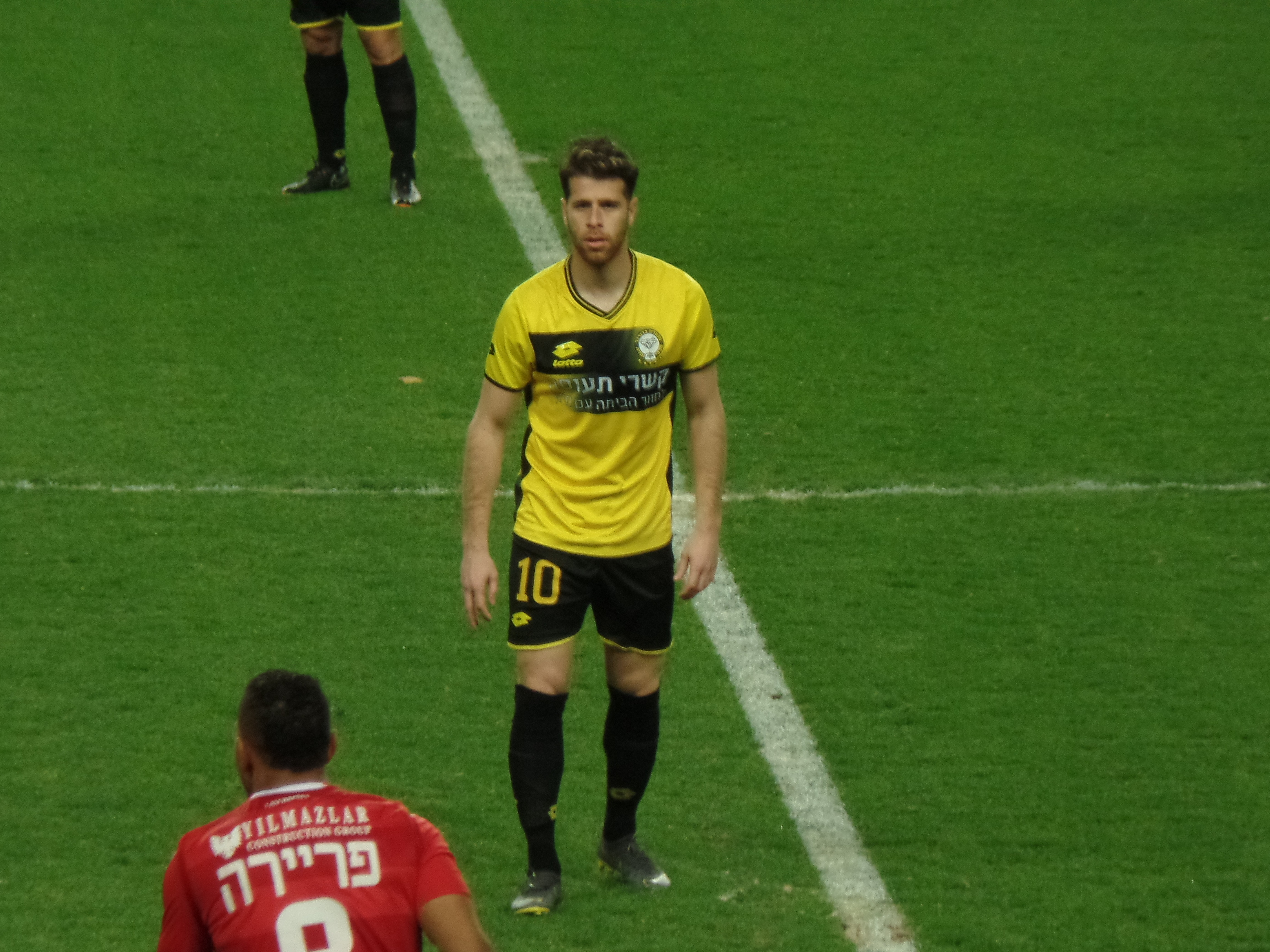 גיא מלמד במדי מכבי נתניה, 2019